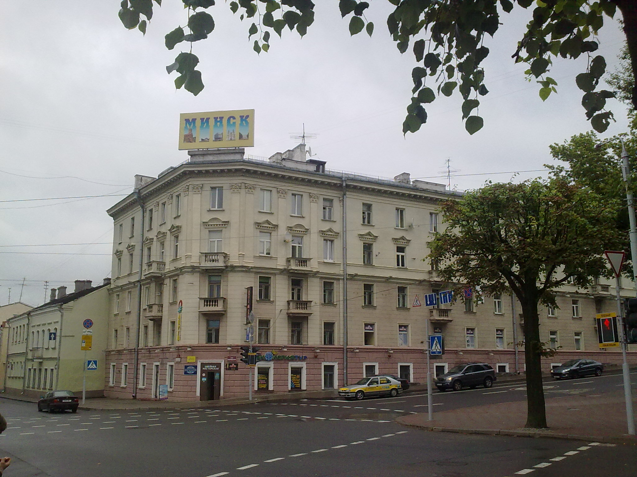 Мінск. Вуліца Інтэрнацыянальная/Гарадскі Вал. 2012